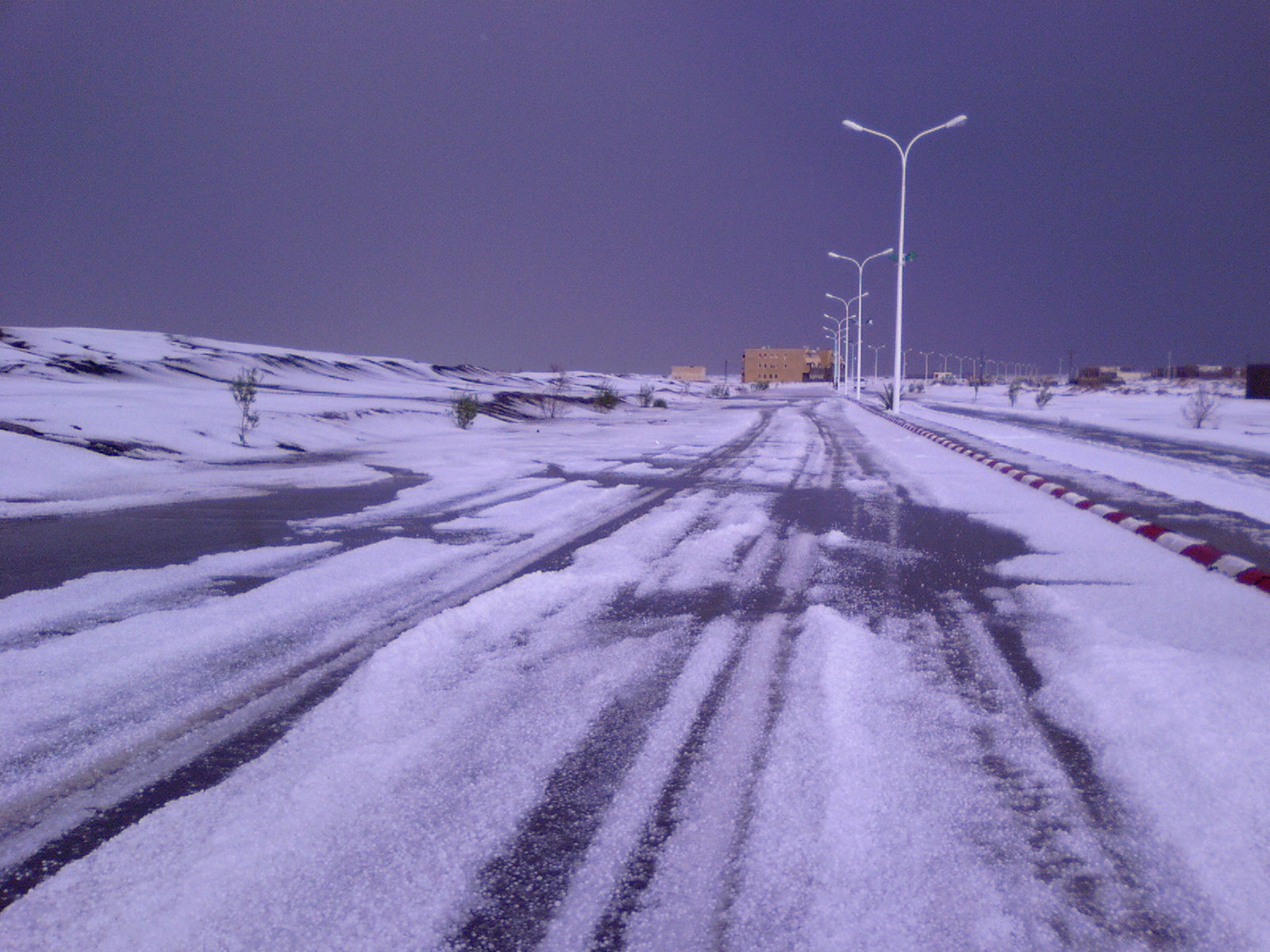 Kenadsa sous la neige